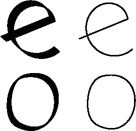 Med Metafont går det att välja olika pennor för att producera olika former med samma penseldrag.